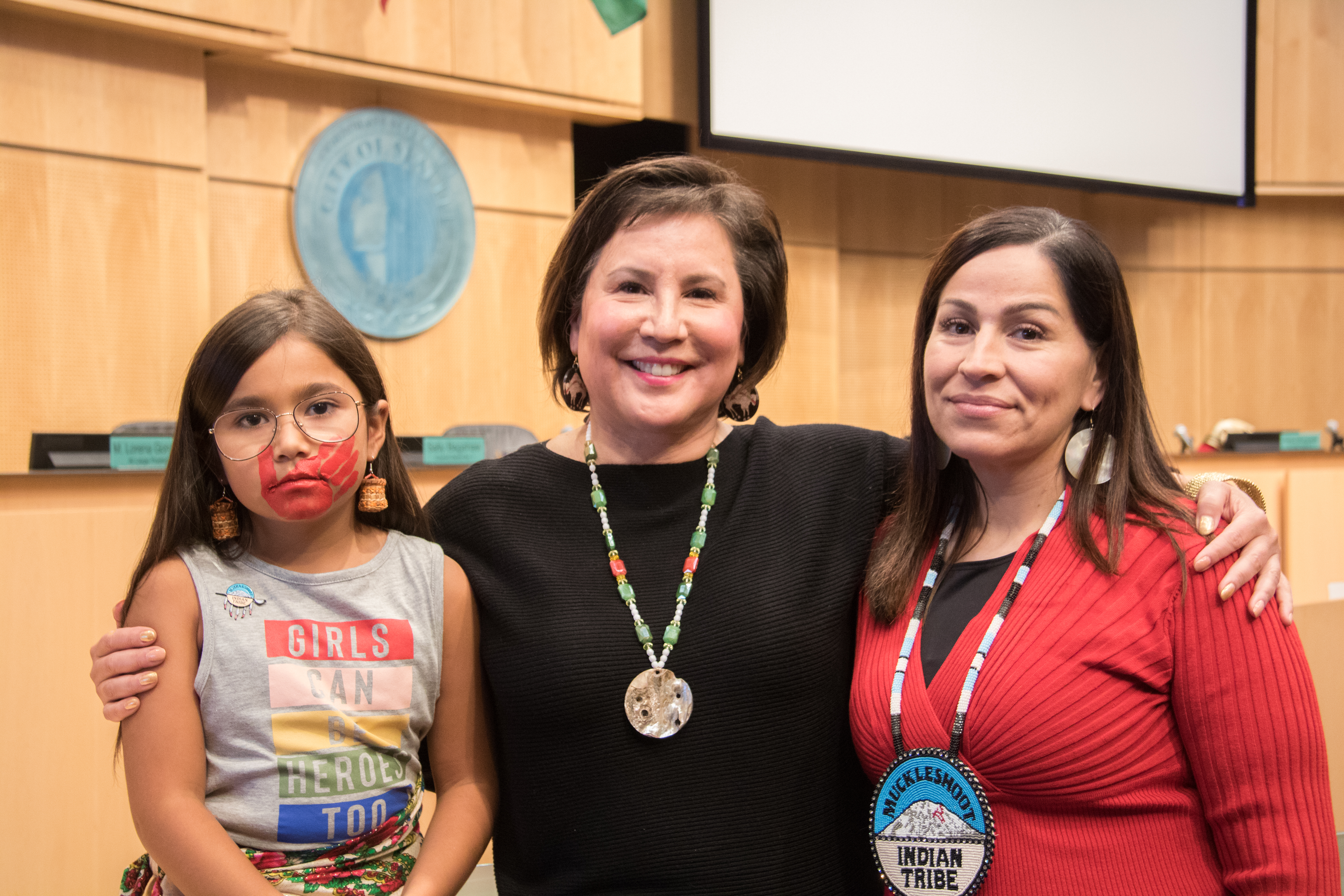 Juarez-MMIWG-24